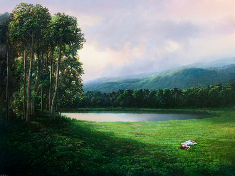 Leticia, 2010, óleo sobre lienzo, 114 x 164 cm.